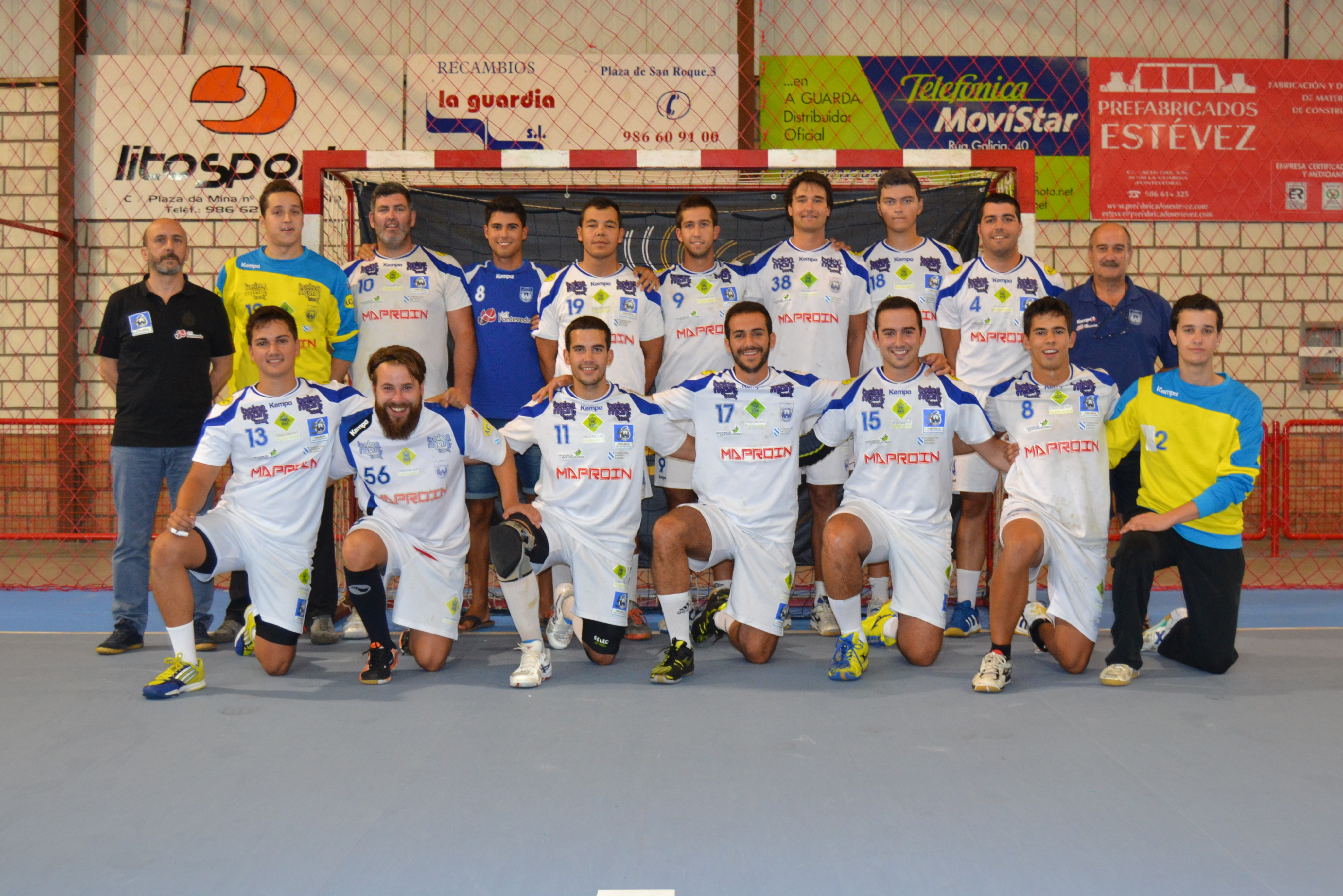 Club Cisne no Torneo Concello do Rosal 2014